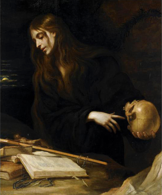 Magdalena. Óleo sobre lienzo, 110 x 88,5 cm.